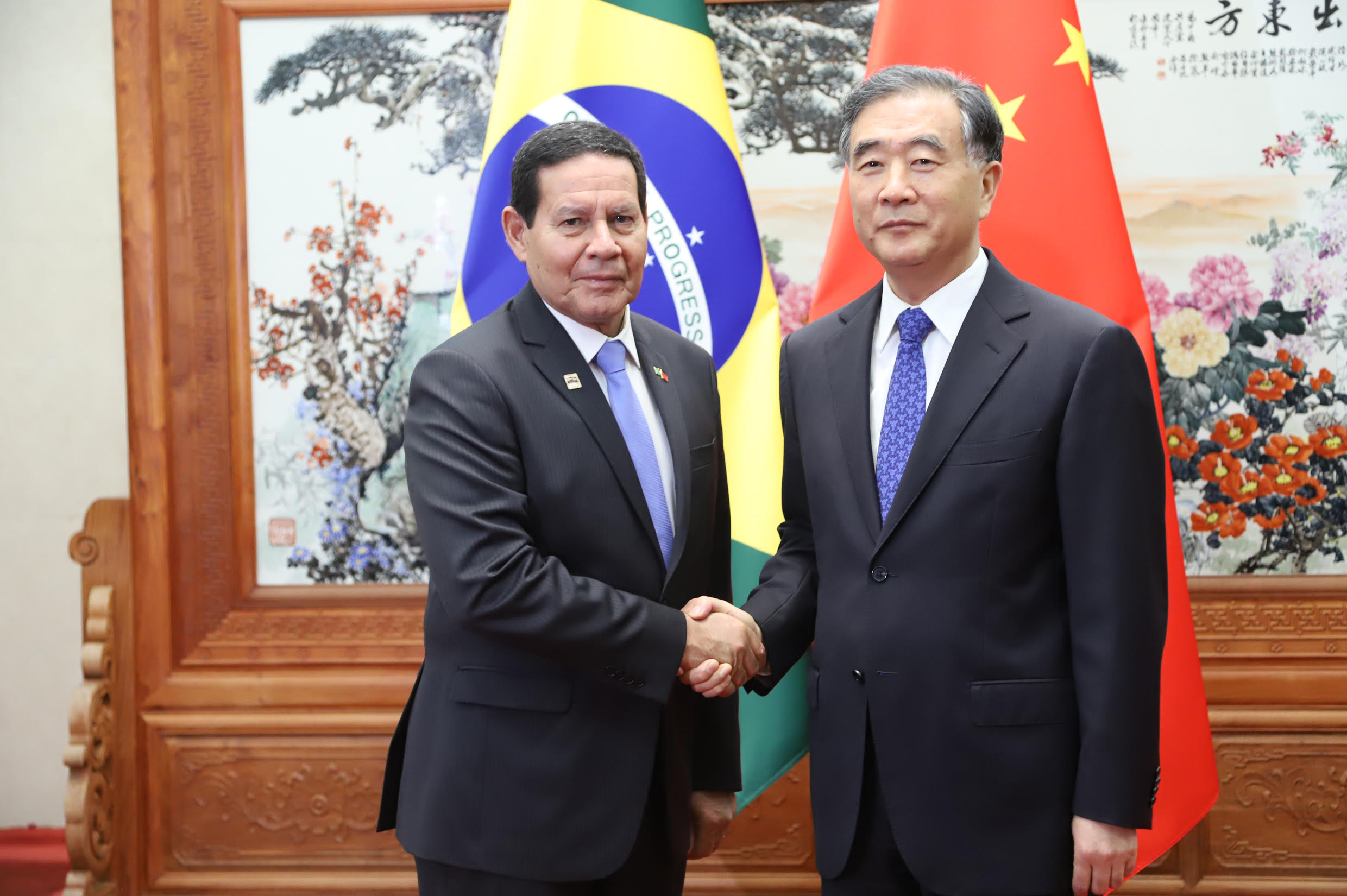 (Pequim - China, 24/05/2019) Vice-Presidente da República, Hamilton Mourão, durante audiência com o Presidente da Conferência Consultiva Política do Povo Chinês, Senhor Wang Yang. Foto: Adnilton Farias / VPR